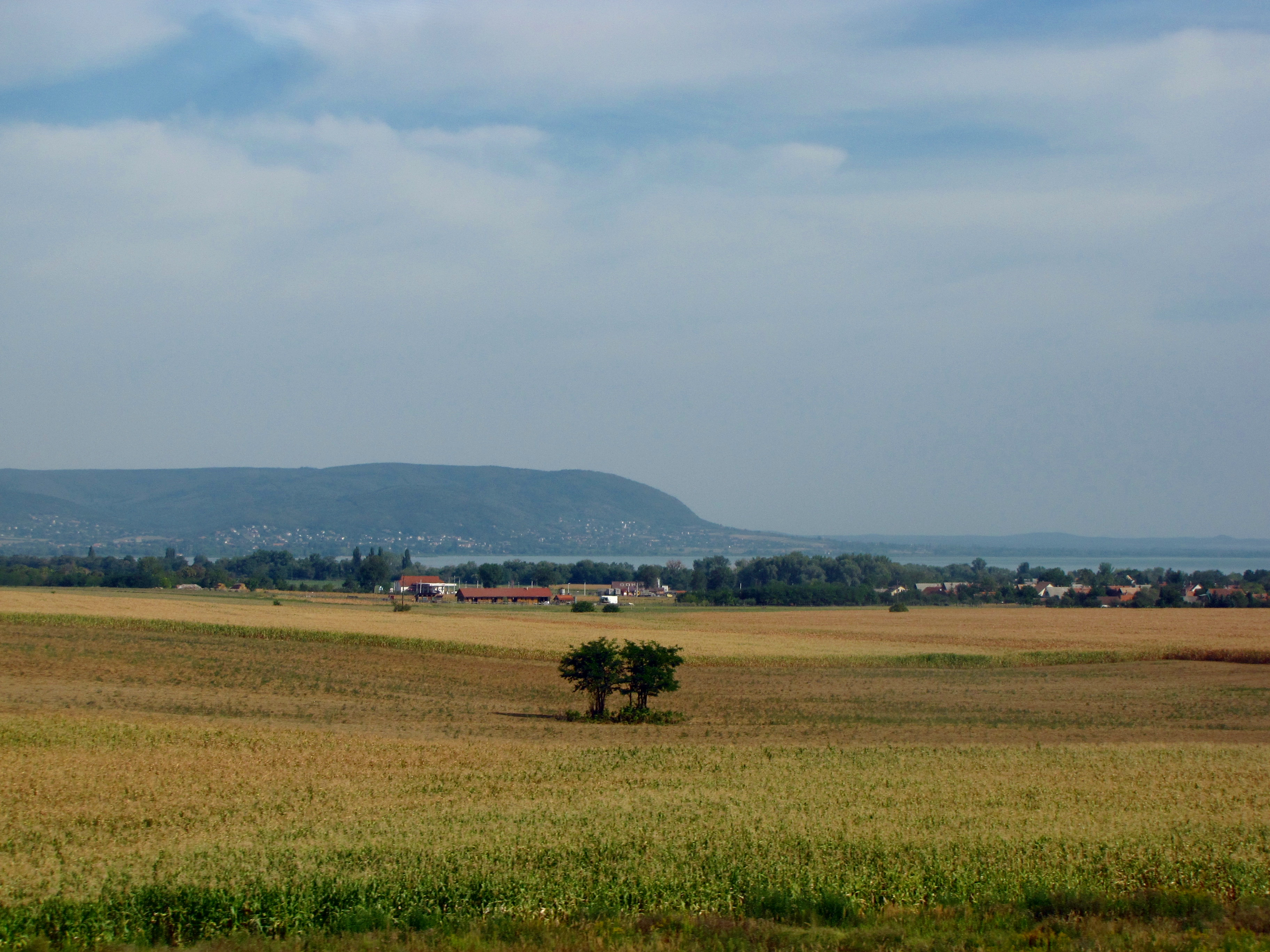 Balaton. Táska